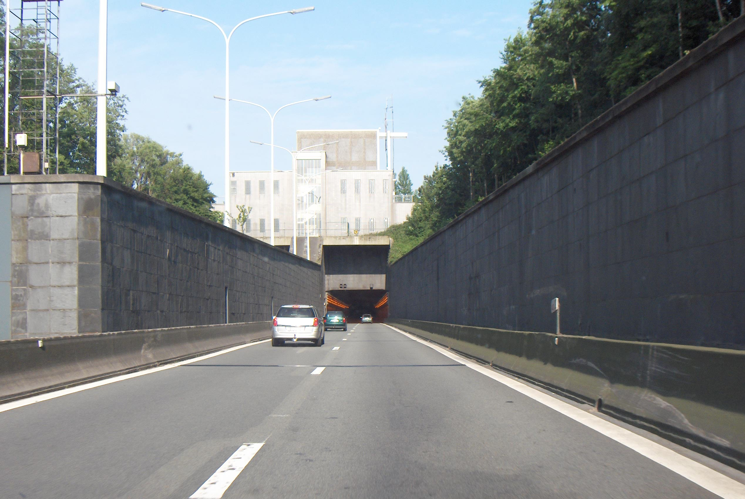 Autobahn E34, Tunnel unter dem Gent-Terneuzen-Kanal (in der Nähe von Zelzate, Belgien, Prov. Ostflandern).